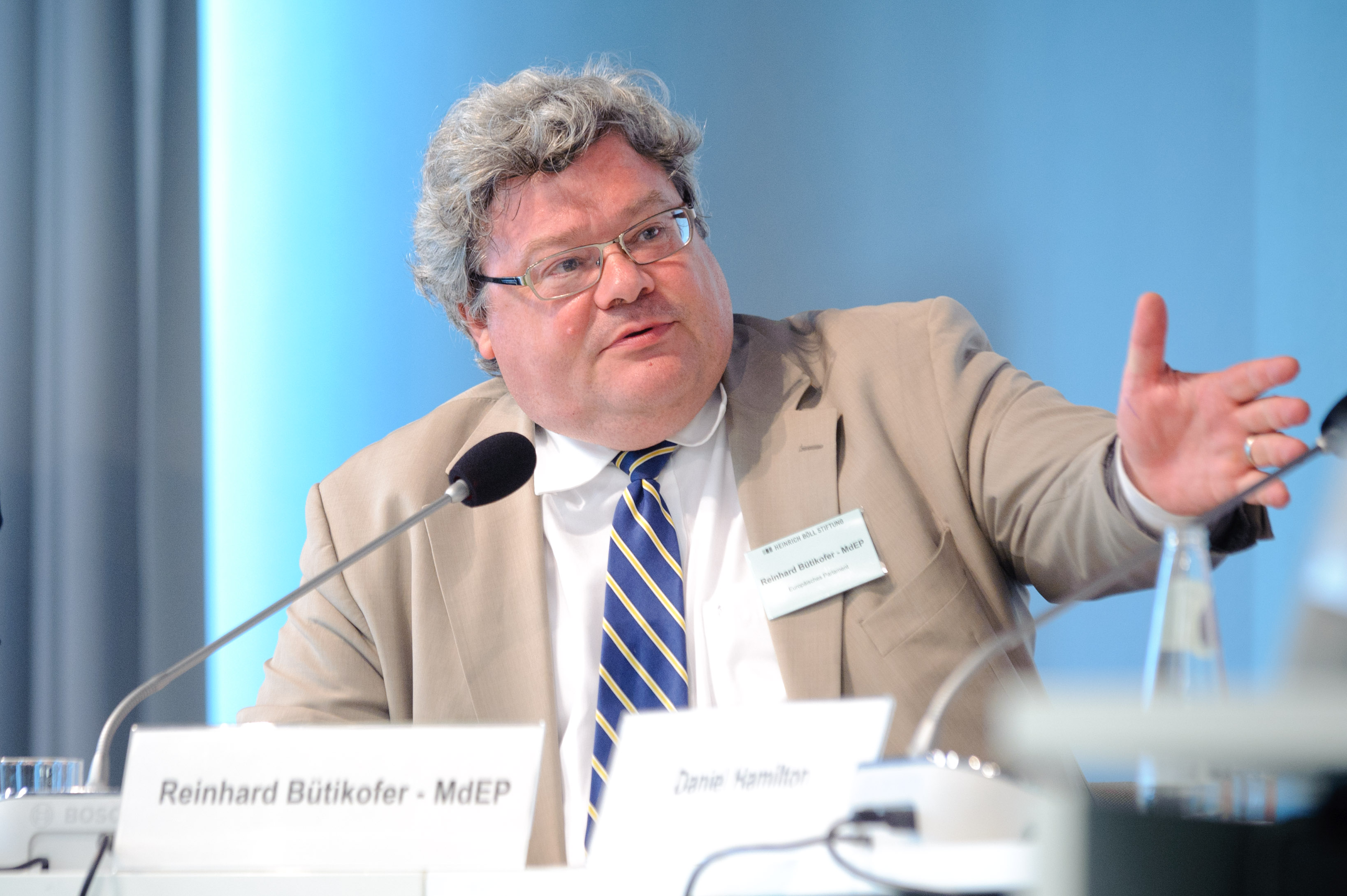 Reinhard Bütikofer (MdEP, Die Grünen/EFA, Brüssel)